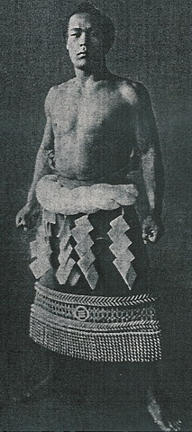 第33代 横綱 武蔵山武